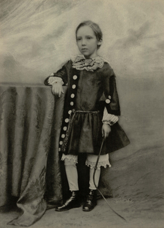 Robert Louis Stevenson mit sieben Jahren